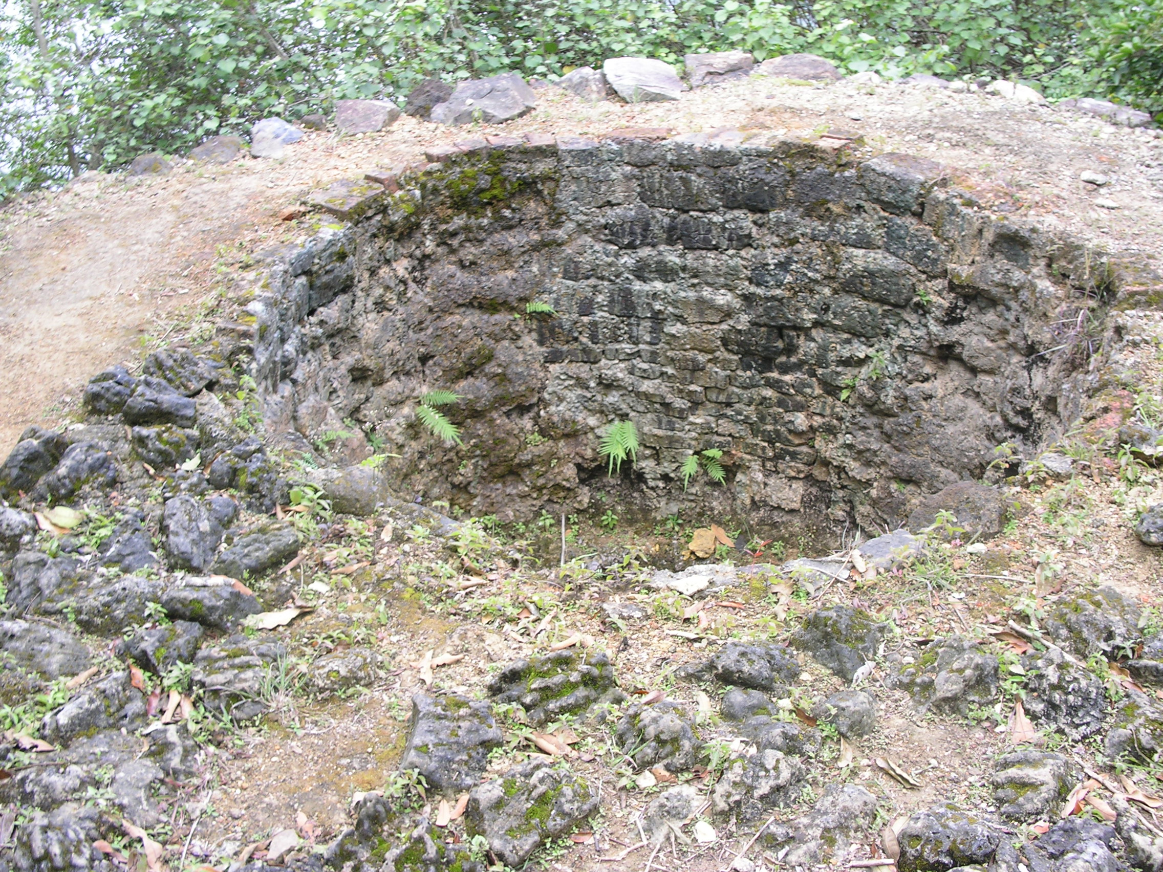 Photo taken in Sheung Yiu,Hong Kong.於上窰村所拍攝的法定古蹟--灰窰遺址。